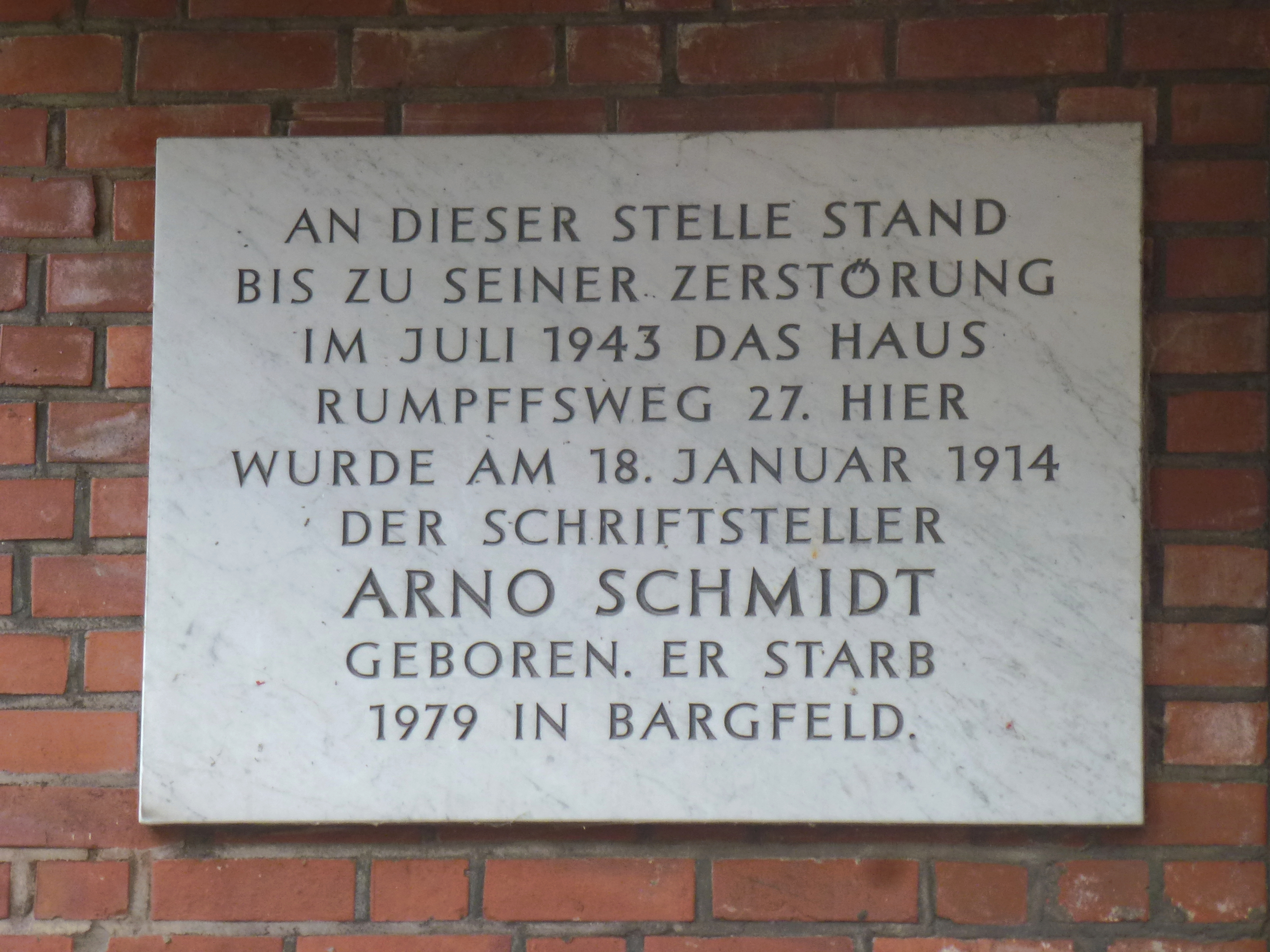 Gedenktafel am Grundstück Rumpffsweg 27, 20537 Hamburg-Hamm; auf dem Grundstück stand bis 1943 das Geburtshaus von Arno Schmidt